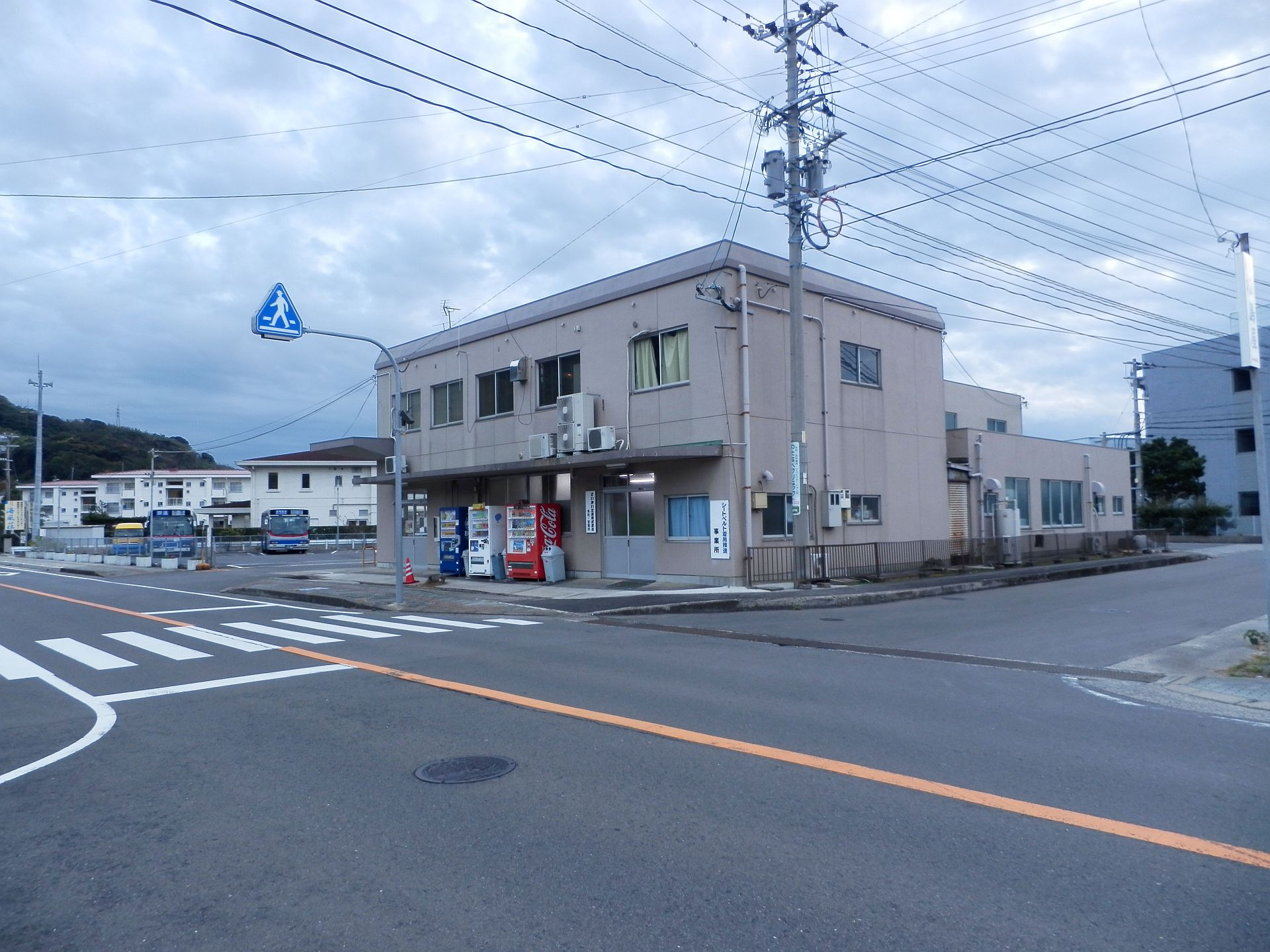 さいかい交通本社全景